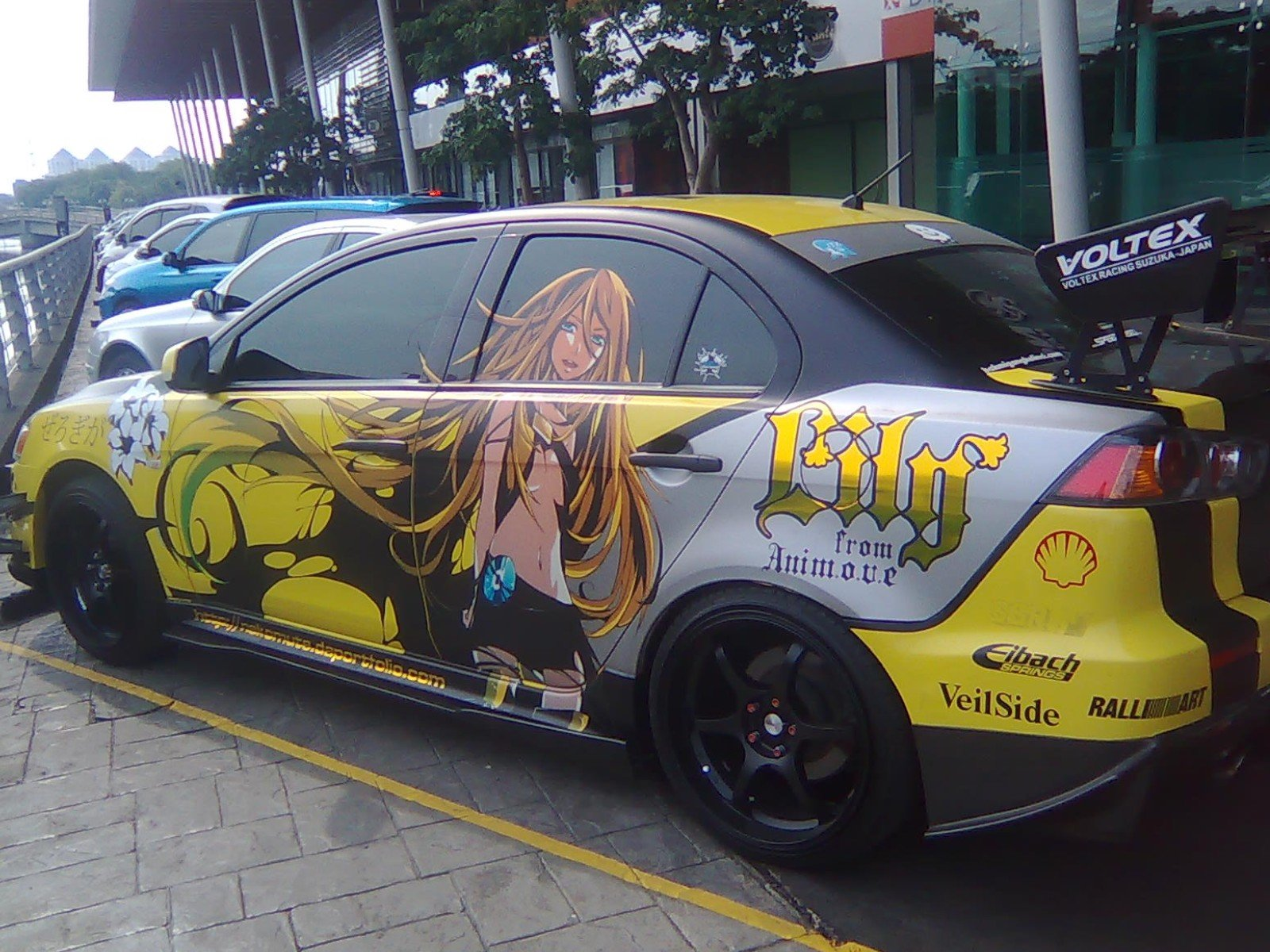 Sebuah itasha yang ditemui di parkiran VIP Pluit Village, 27 Oktober 2013